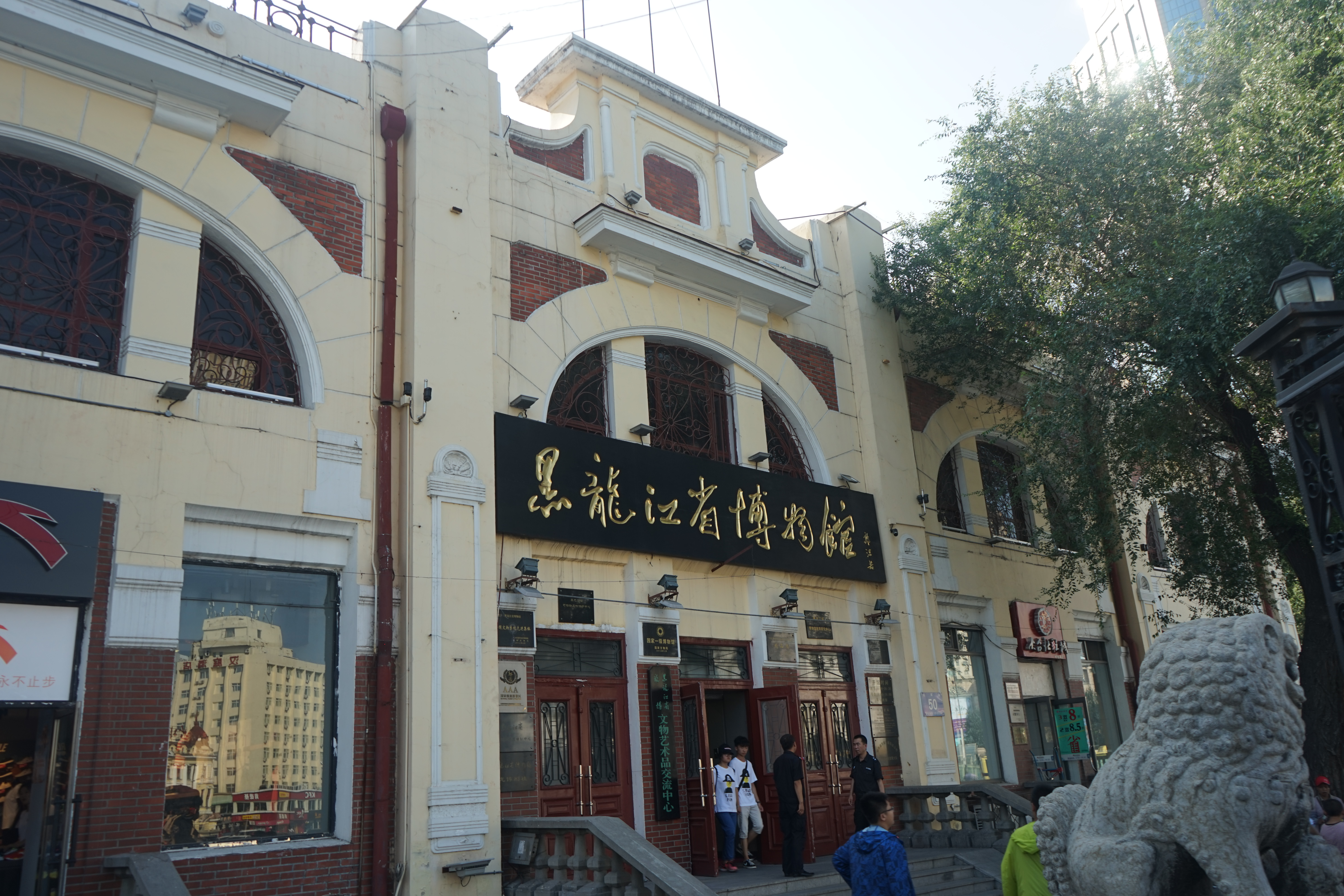 黑龙江省博物馆入口